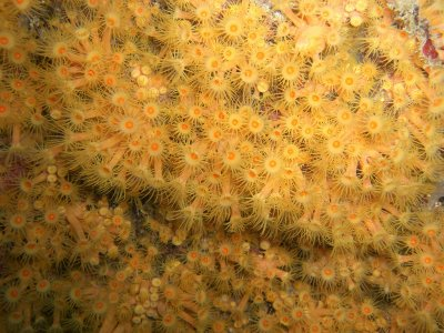 Autrice: Francesca KIX D'Errico Sito dell'autrice: Fonte: mercoledì 11 aprile 2007 (file) Note: Parazoanthus axinellae